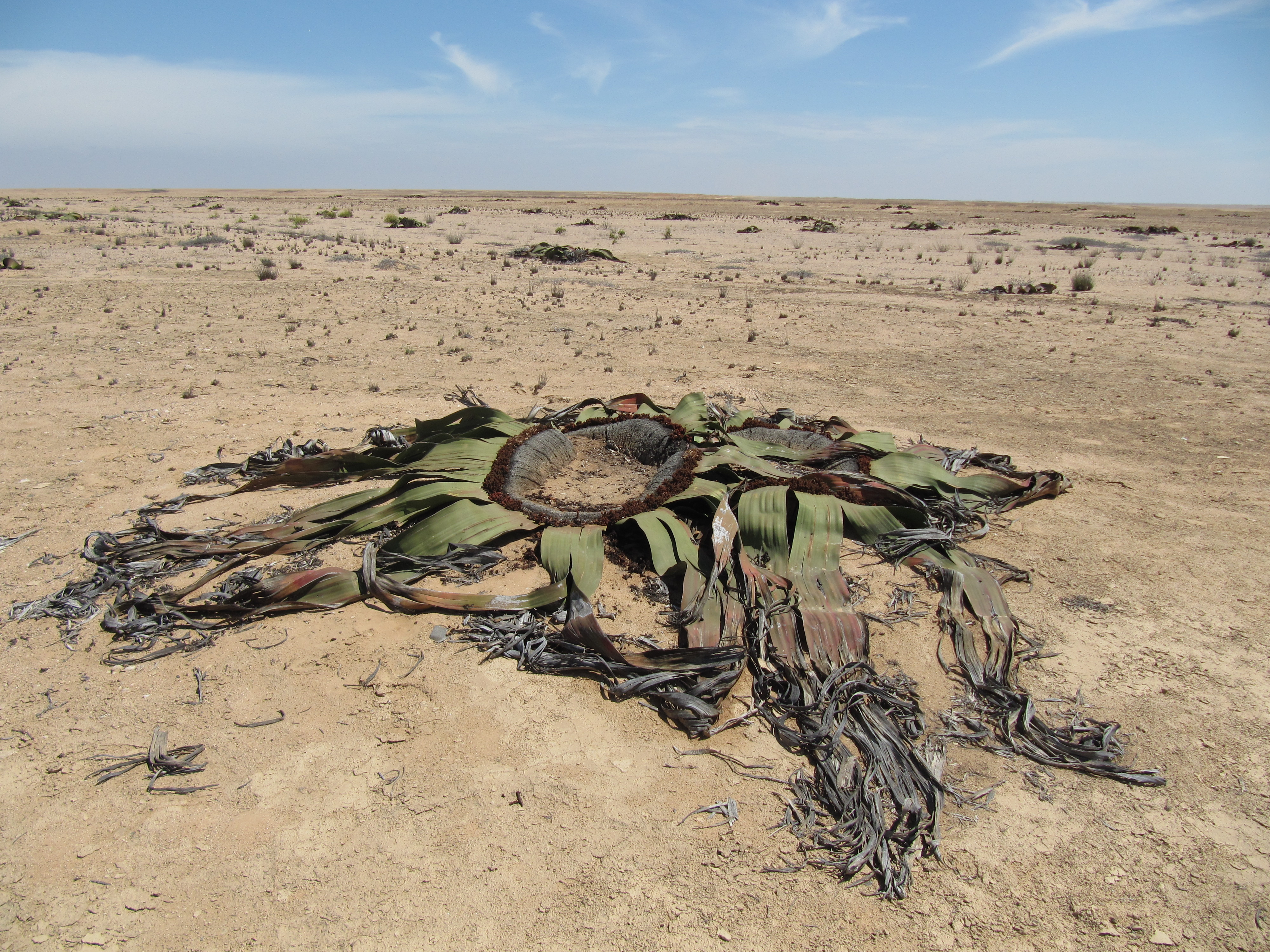 Welwitschia mirabilis in the Namib desert, Angola